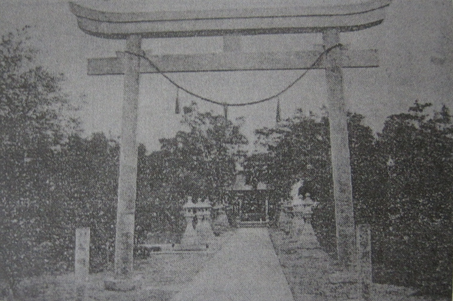 吉野神社（原始出處是吉野村居住民會的《吉野村概況書》）